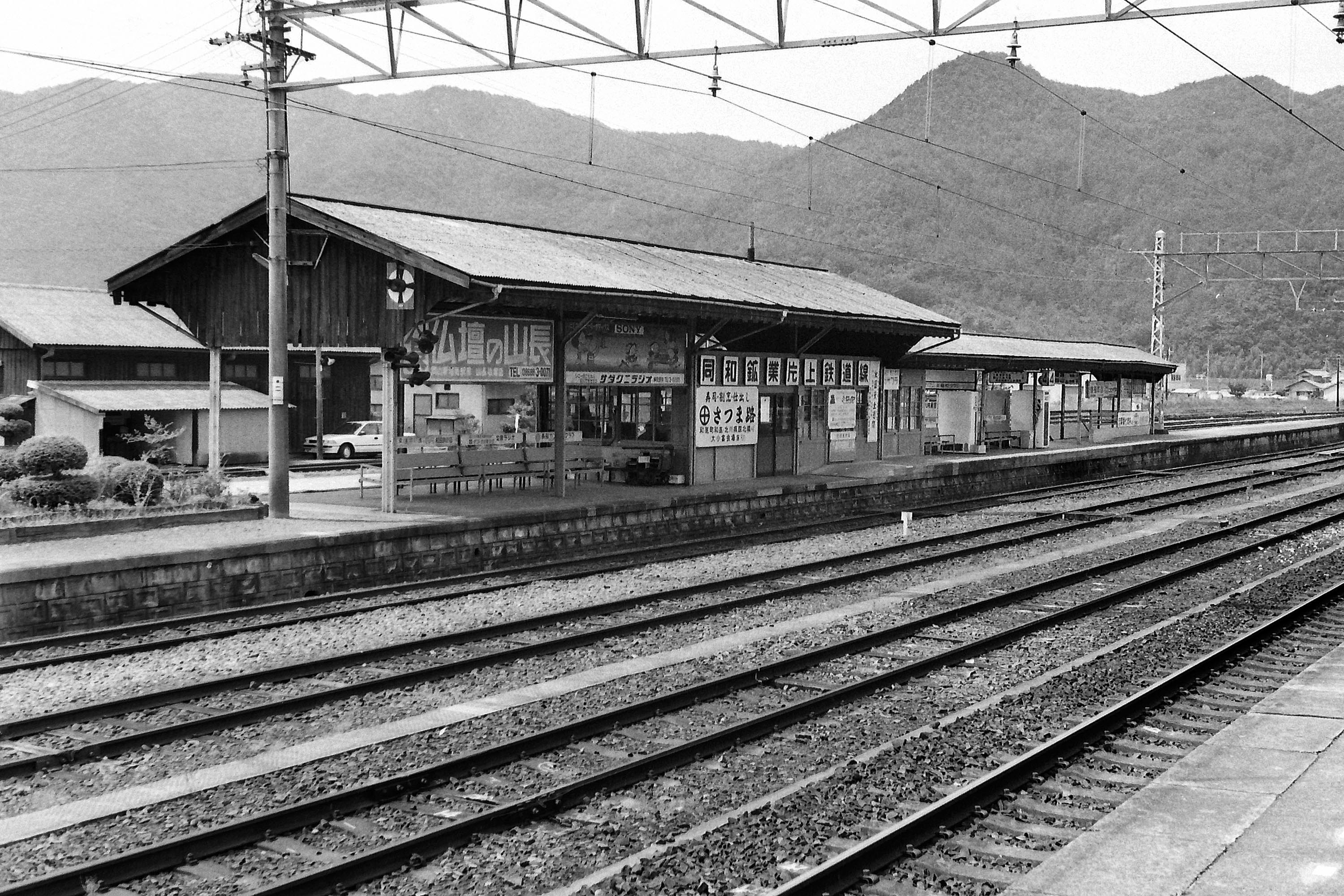 同和鉱業片上鉄道事業所和気駅本屋を山陽本線ホームから撮影